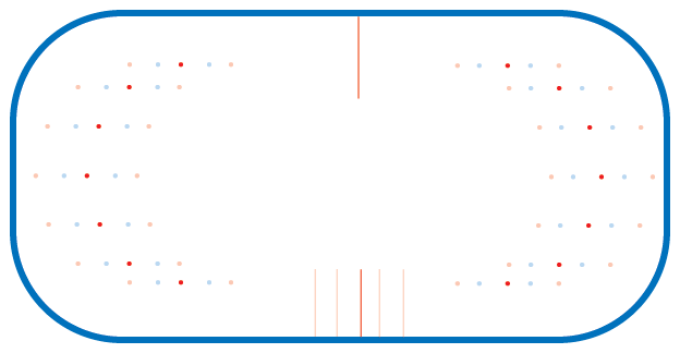 Een shorttrackbaan met de posities van de gebruikte lijnen en blokken